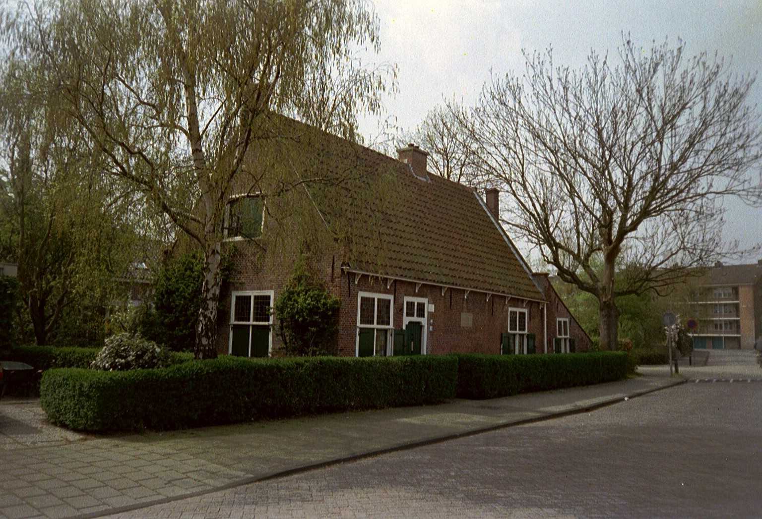 Spinozahuisje, Spinozalaan, Rijnsburg.